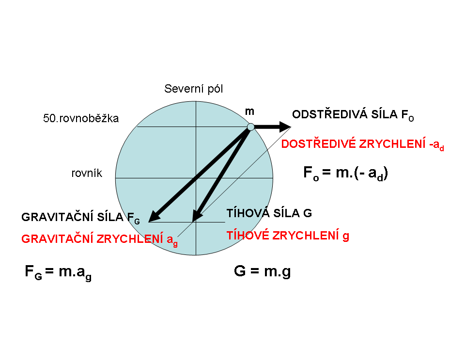 Tíhová síla je výslednicí síly gravitační a odstředivé.Tíhové zrychlení je výslednicí zrychlení gravitačního a "odstředivého" (záporné dostředivé).